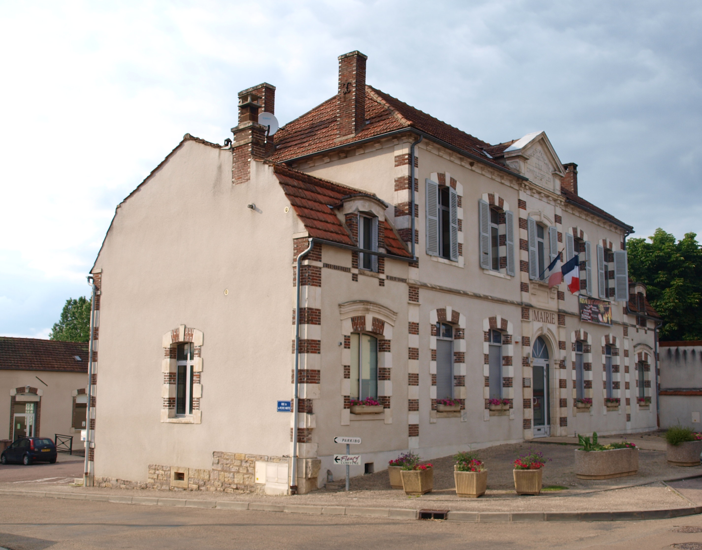 Fleury-la-Vallée (Yonne, France) , mairie